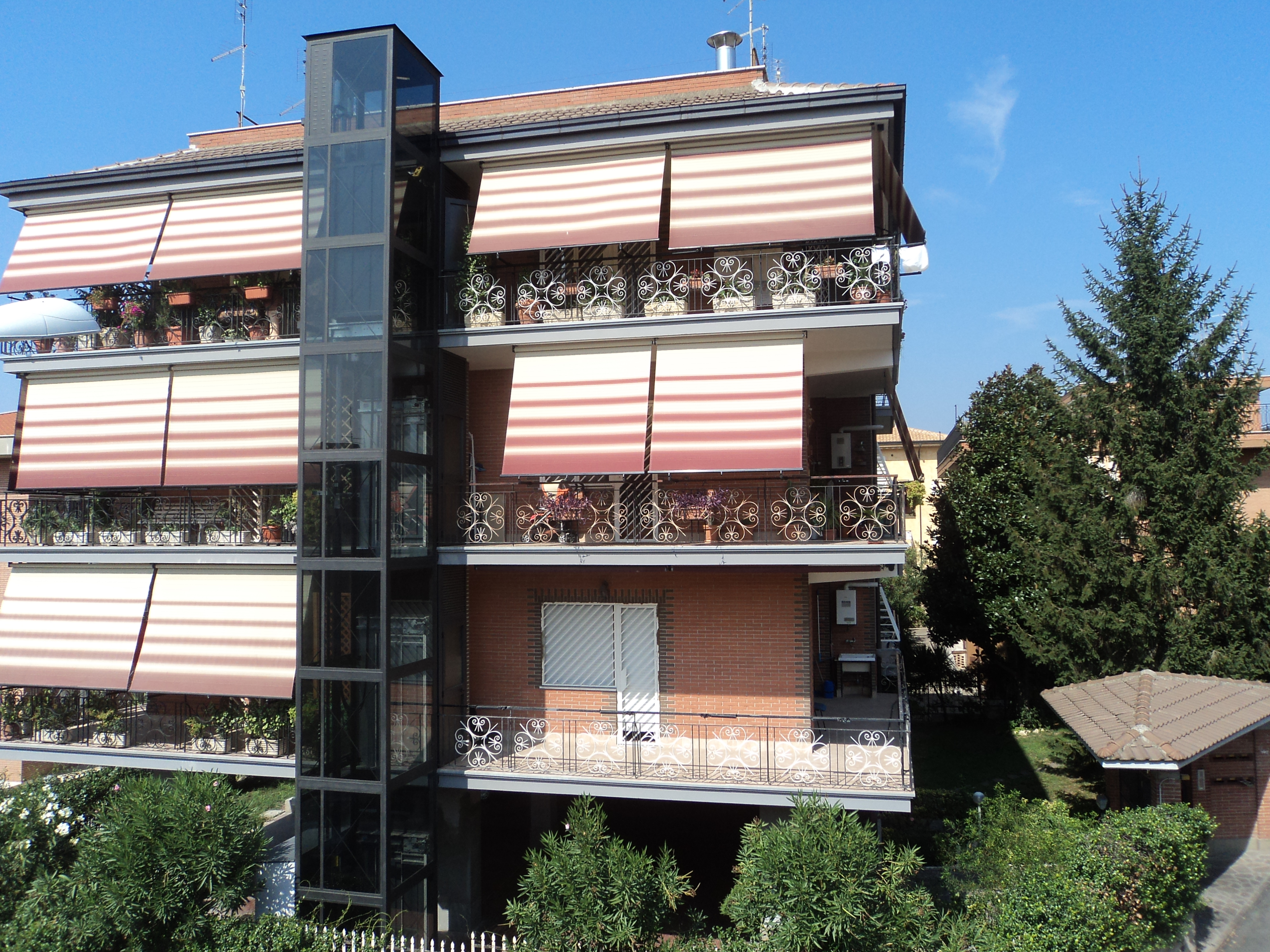 Palazzo....